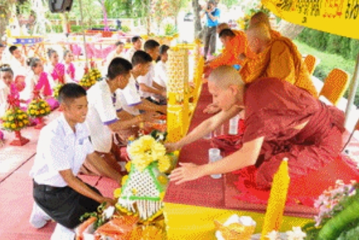 พิธีถวายเทียนพรรษา ปีการศึกษา 2554